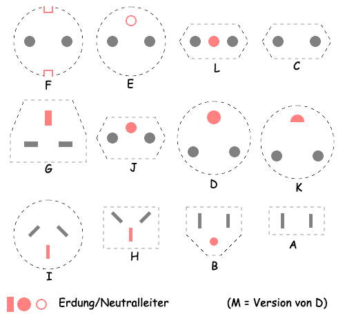 Stecker: Deutschland (F), Frankreich und Polen (E), Italien (L), Eurostecker (C), UK (G), Schweiz (J), Indien (D), Grönland (K), Australien und China (I), Israel (H), USA (B und A).